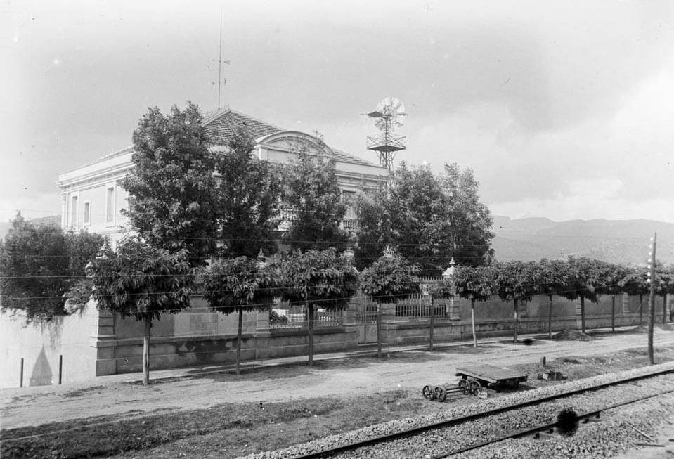 Imatge